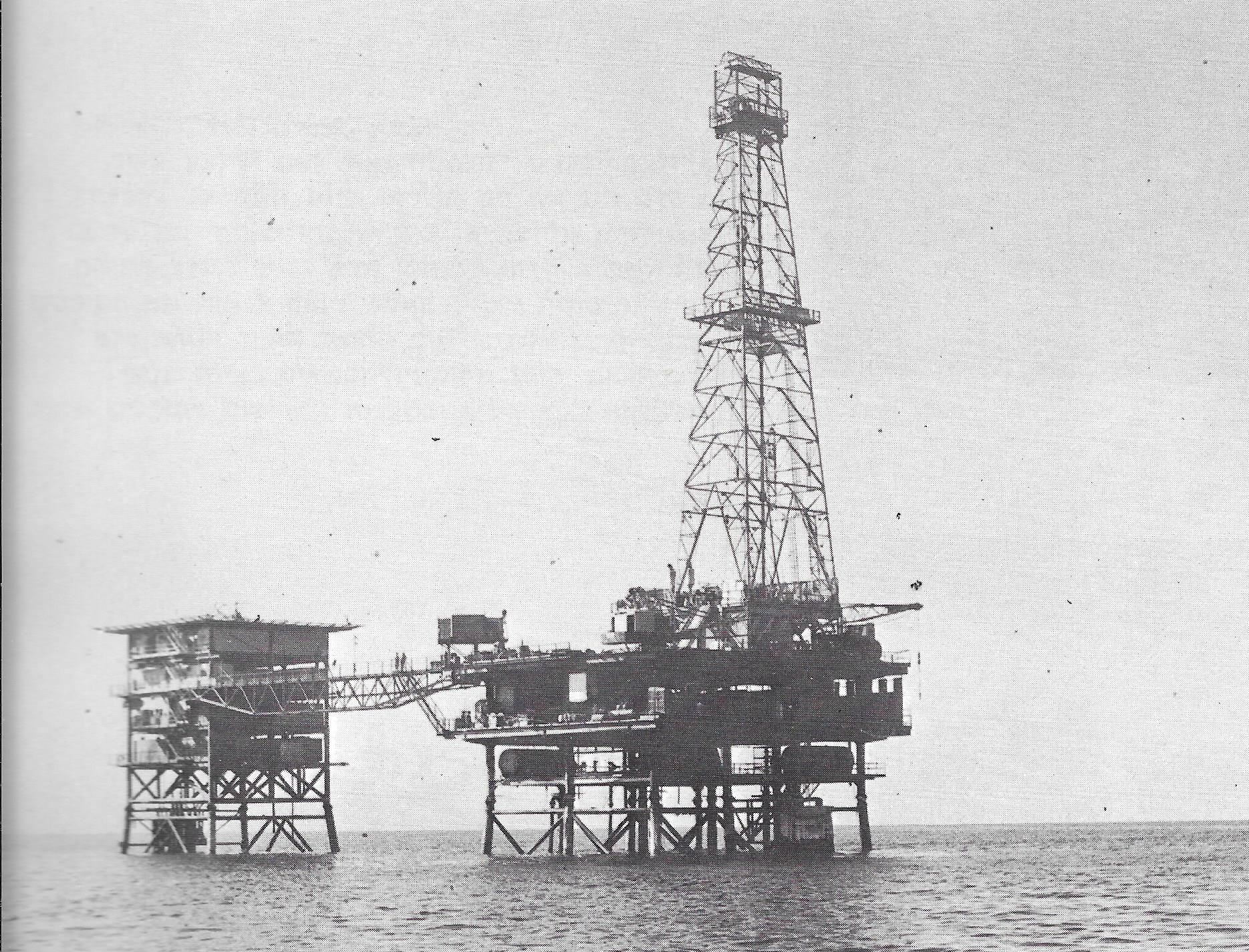 מתקן הפקת נפט בים מול אבו רודס F-10